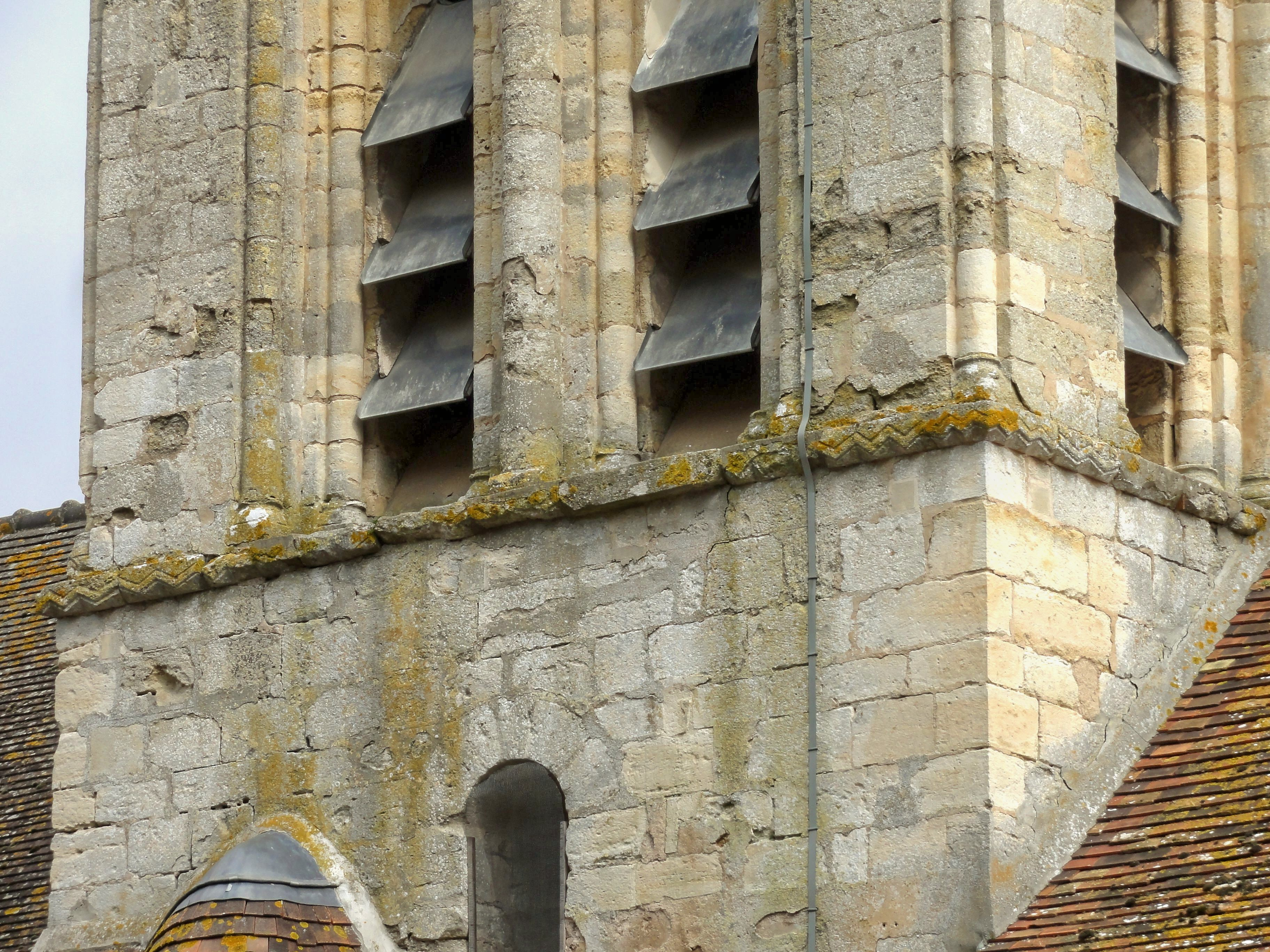 Clocher, détail.